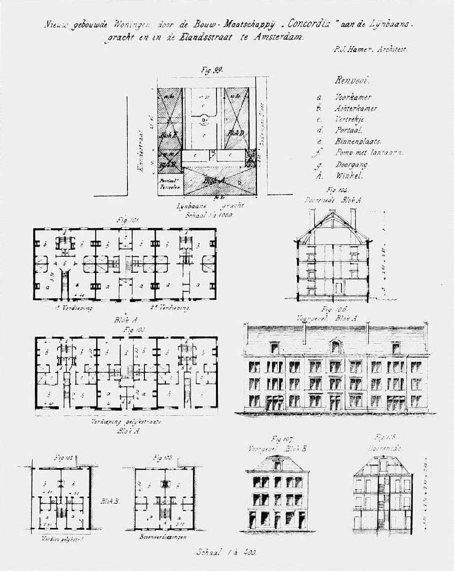 71 arbeiderswoningen voor woningbouwvereniging Concordia, Lijnbaansgracht, Elandsstraat, Amsterdam, situatie, plattegronden, doorsneden, aanzichten. 1859-1860.